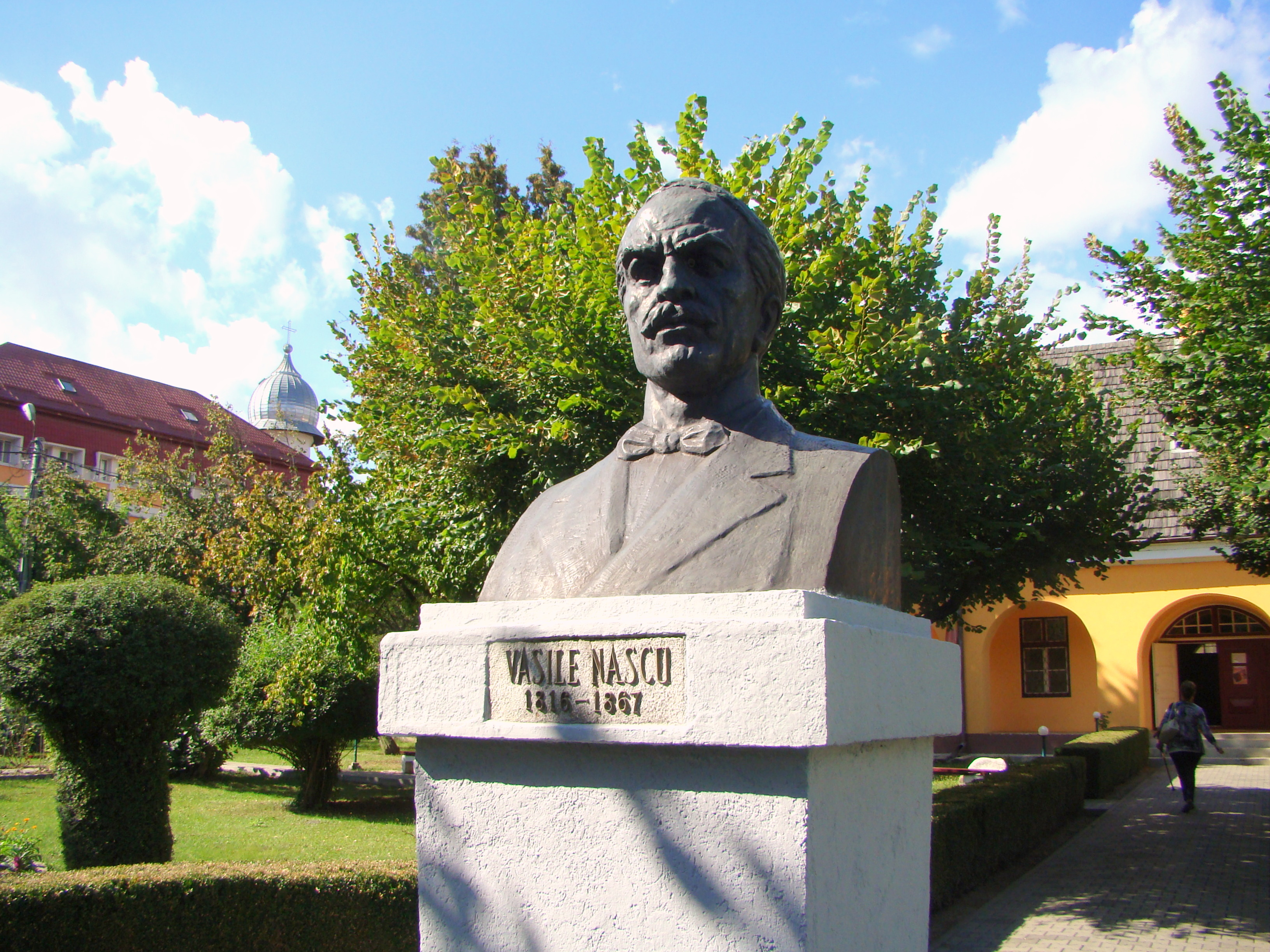 Bustul lui Vasile Nașcu, oraș Năsăud,Str. Grănicerilor 19, în curtea Muzeului Grăniceresc Năsăudean